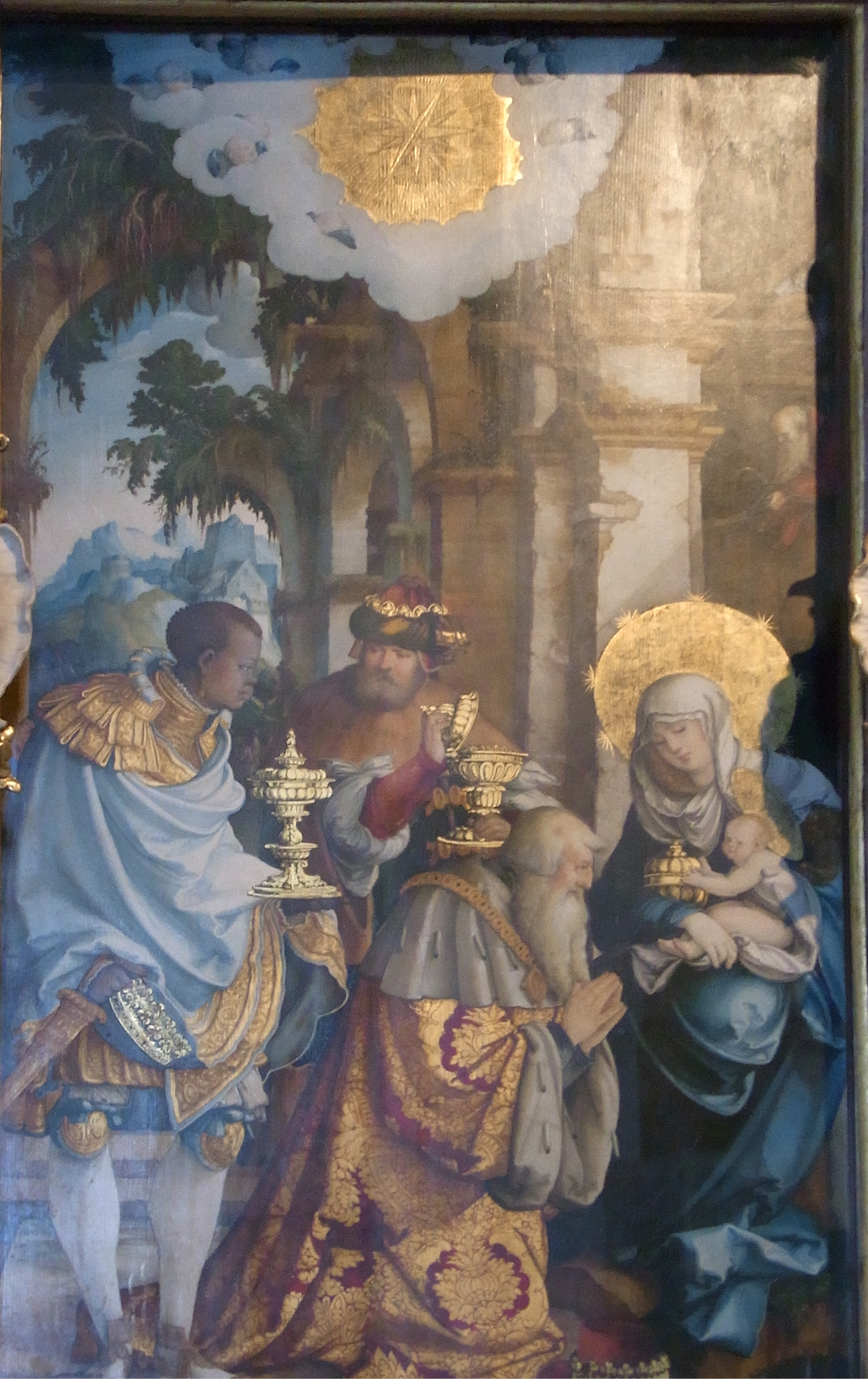 Mittelstück des ehemaligen Hochaltars der St. Martinskirche